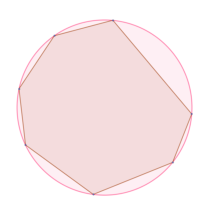 файл создан в среде GeoGebra